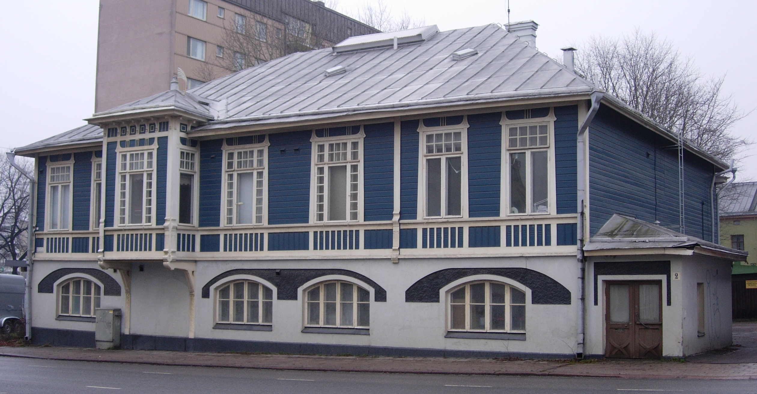 Wikeström & Krogius, ”Sininen talo”. Jugend-tyylinen rakennus vuodelta 1902. Arkkitehti kreivi Carl Armfelt.